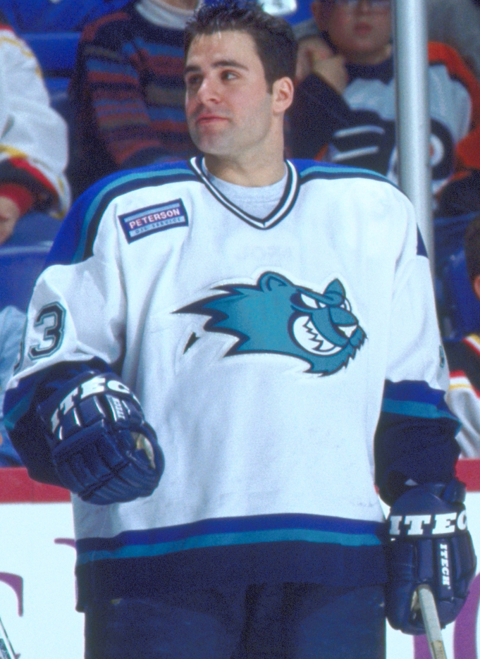 ahlstar0223